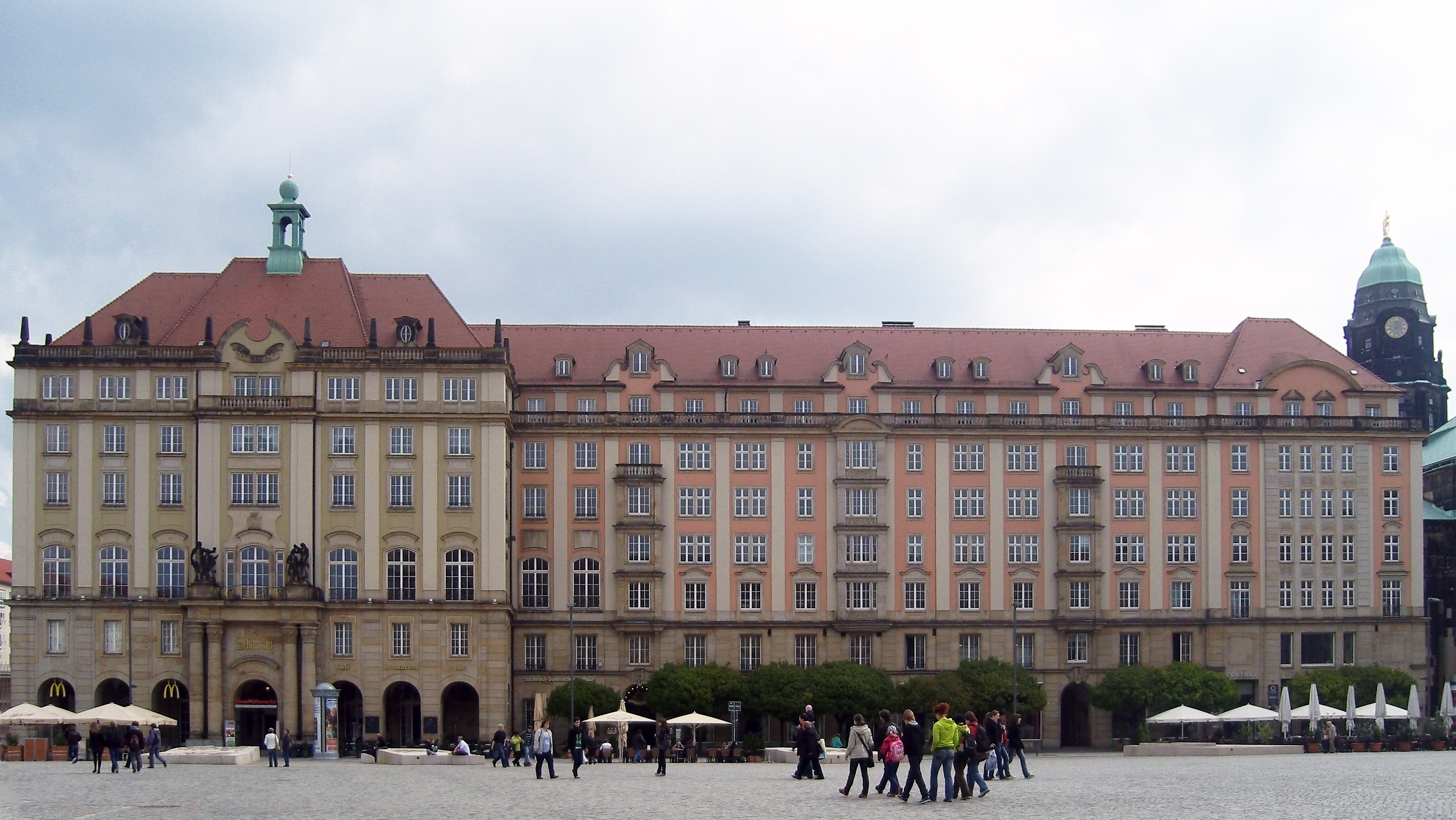 Denkmalgeschütztes Haus Altmarkt 4-6